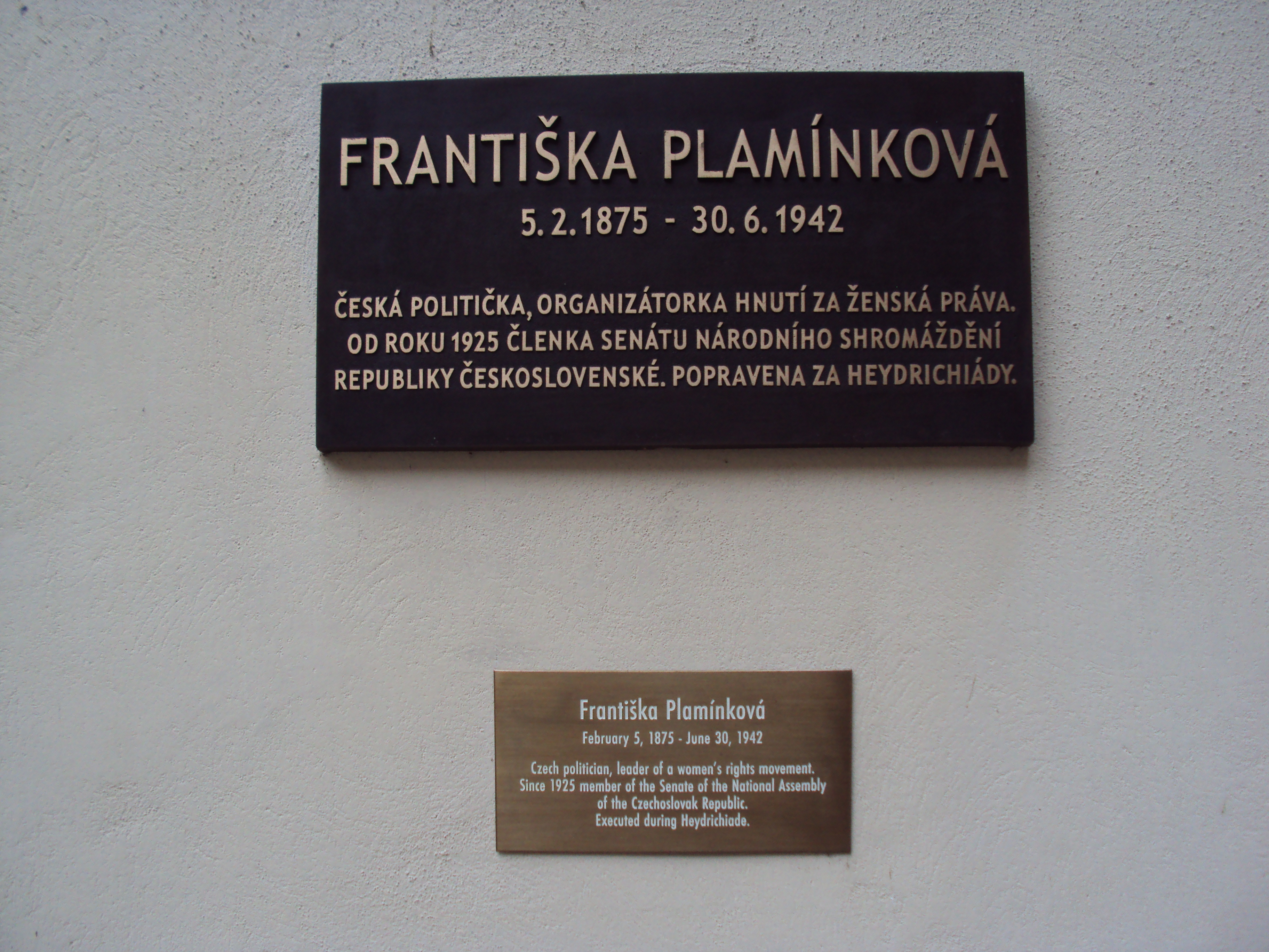 Pamětní deska senátorky Plamínkové na Valštejnském paláci zezadu, od zahrady